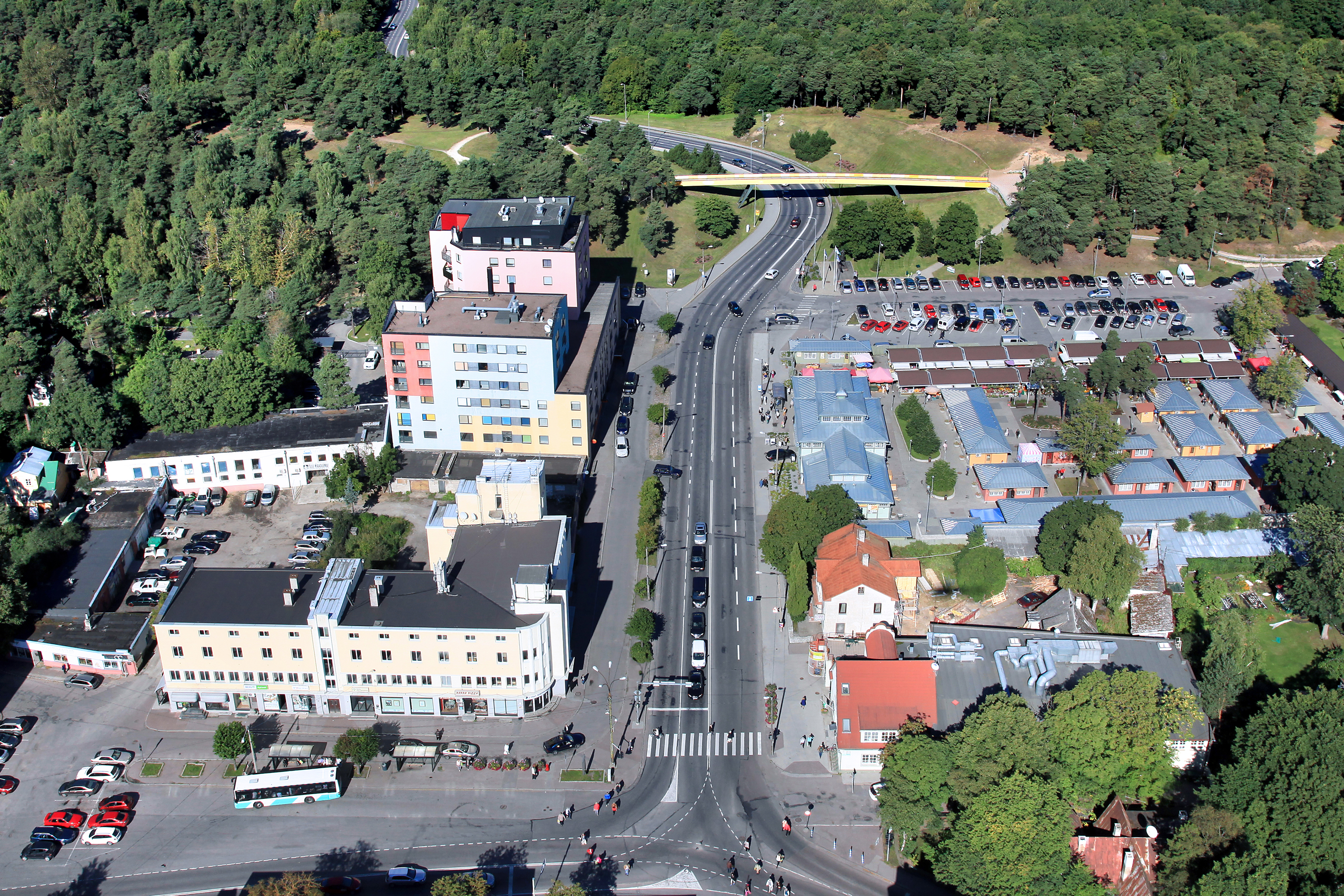 Nõmme turuhoone ja seda ümbritsev hoonestus.